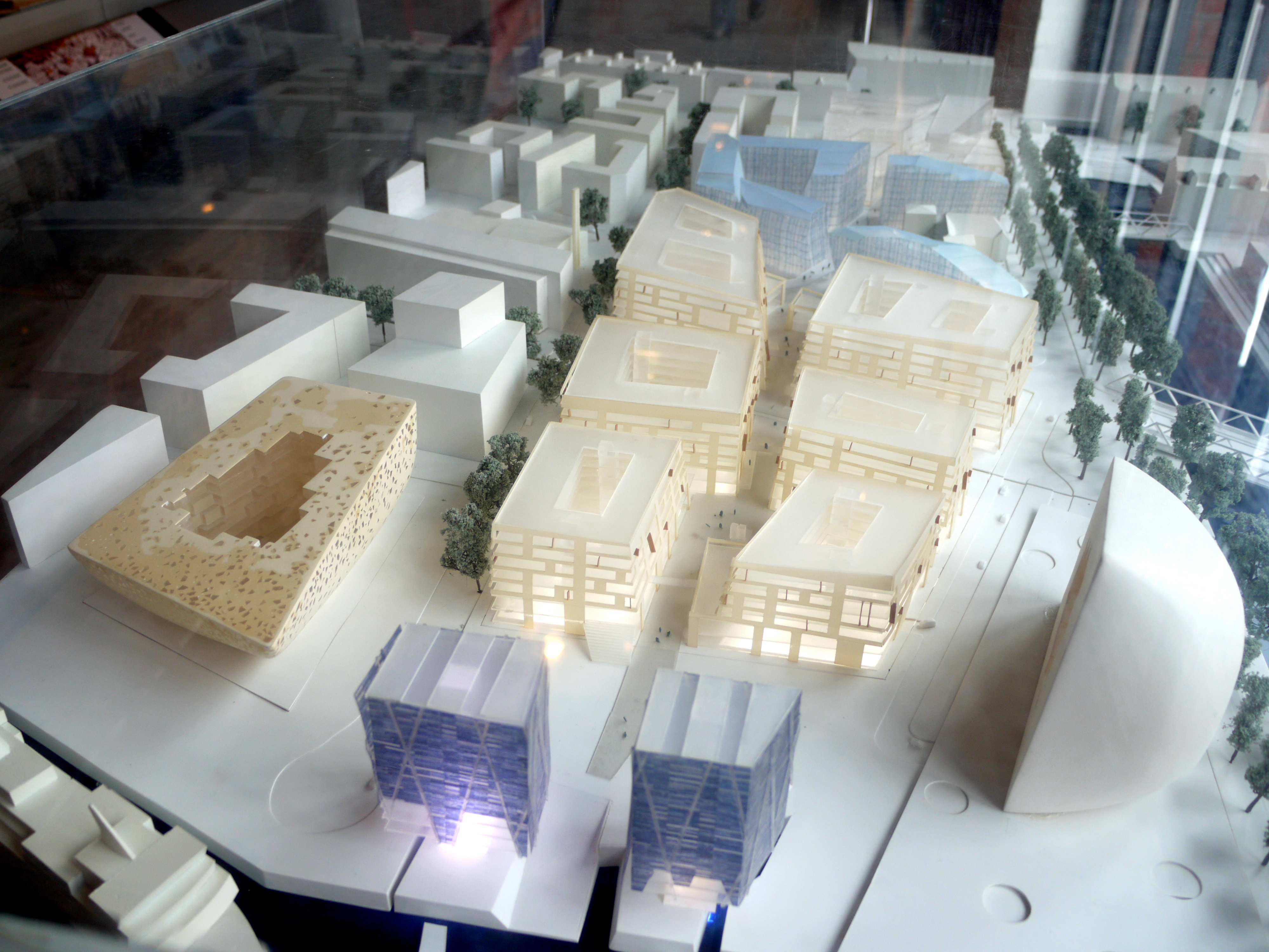 Modell des Überseequatiers, zentrales Teilquartier der HafenCity in Hamburg.